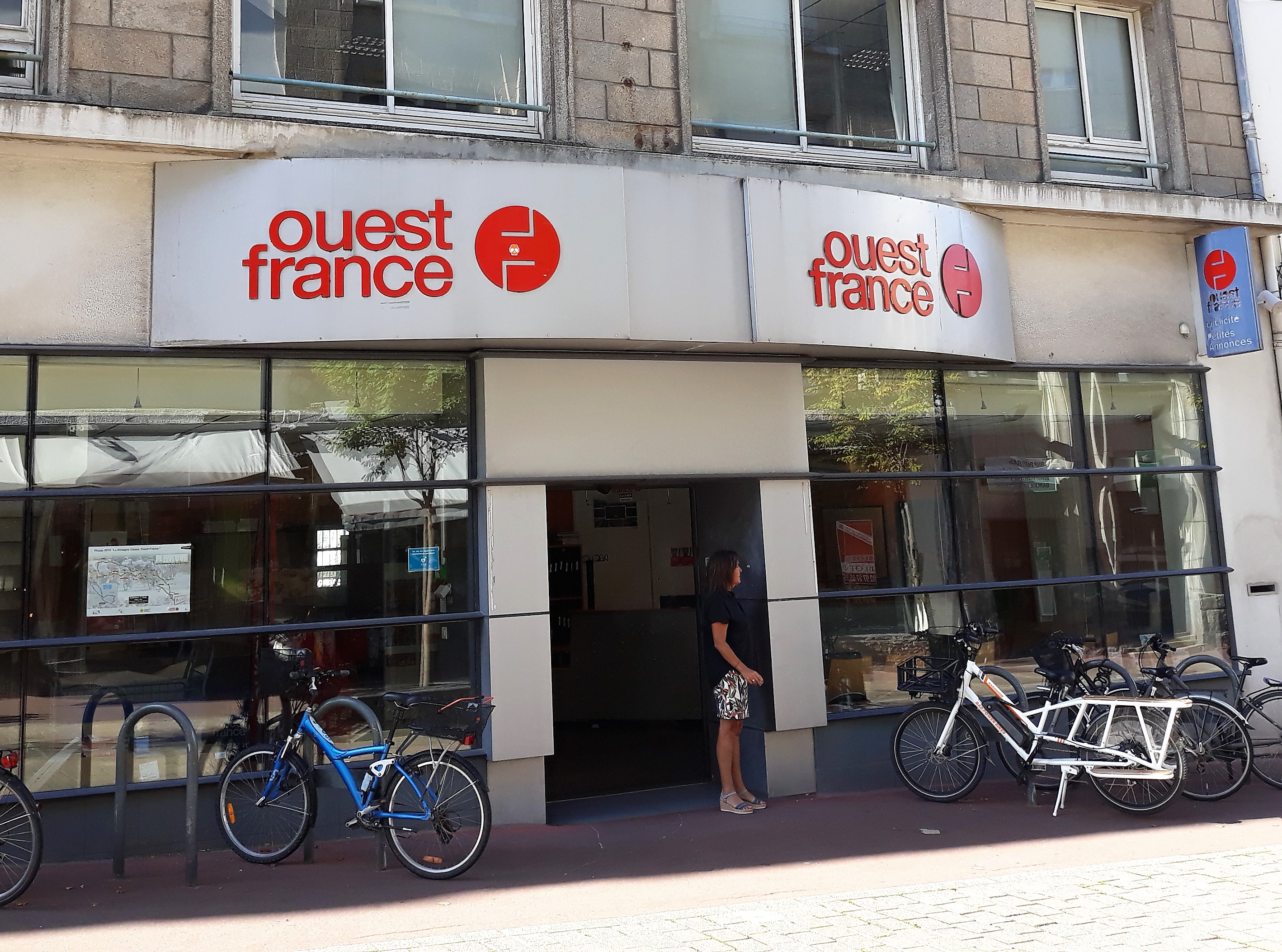 siège de la rédaction lorientaise de Ouest-France